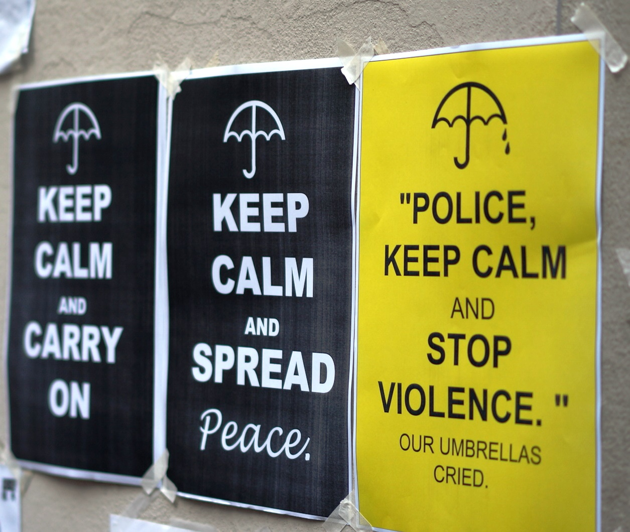 「佔中」運動